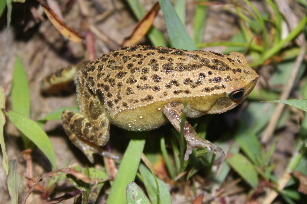 Taken in Wu Kau Tang area.